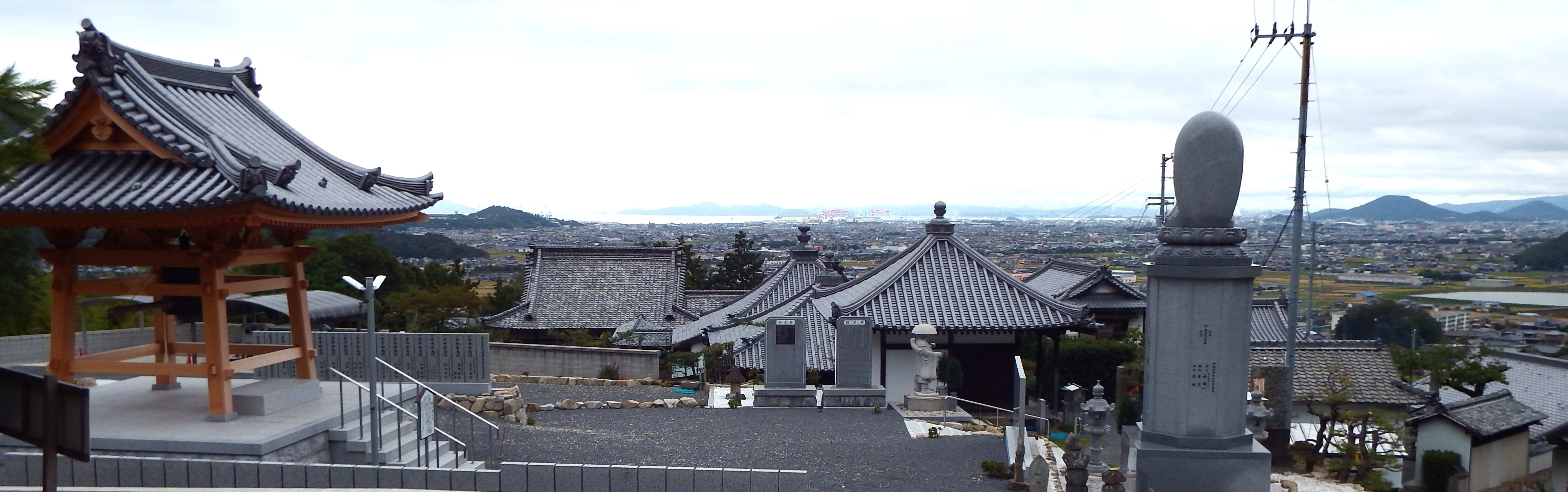 出釈迦寺の全景